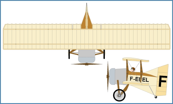 Arnoux HD14 sans queue